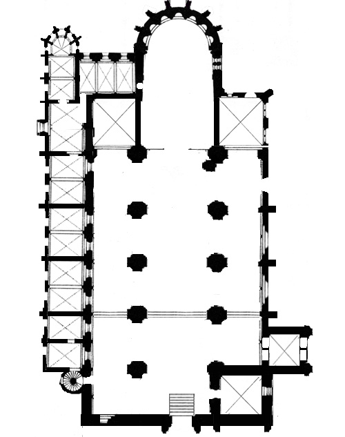 Grundriss der Matthiaskirche, Budapest, Ungarn.